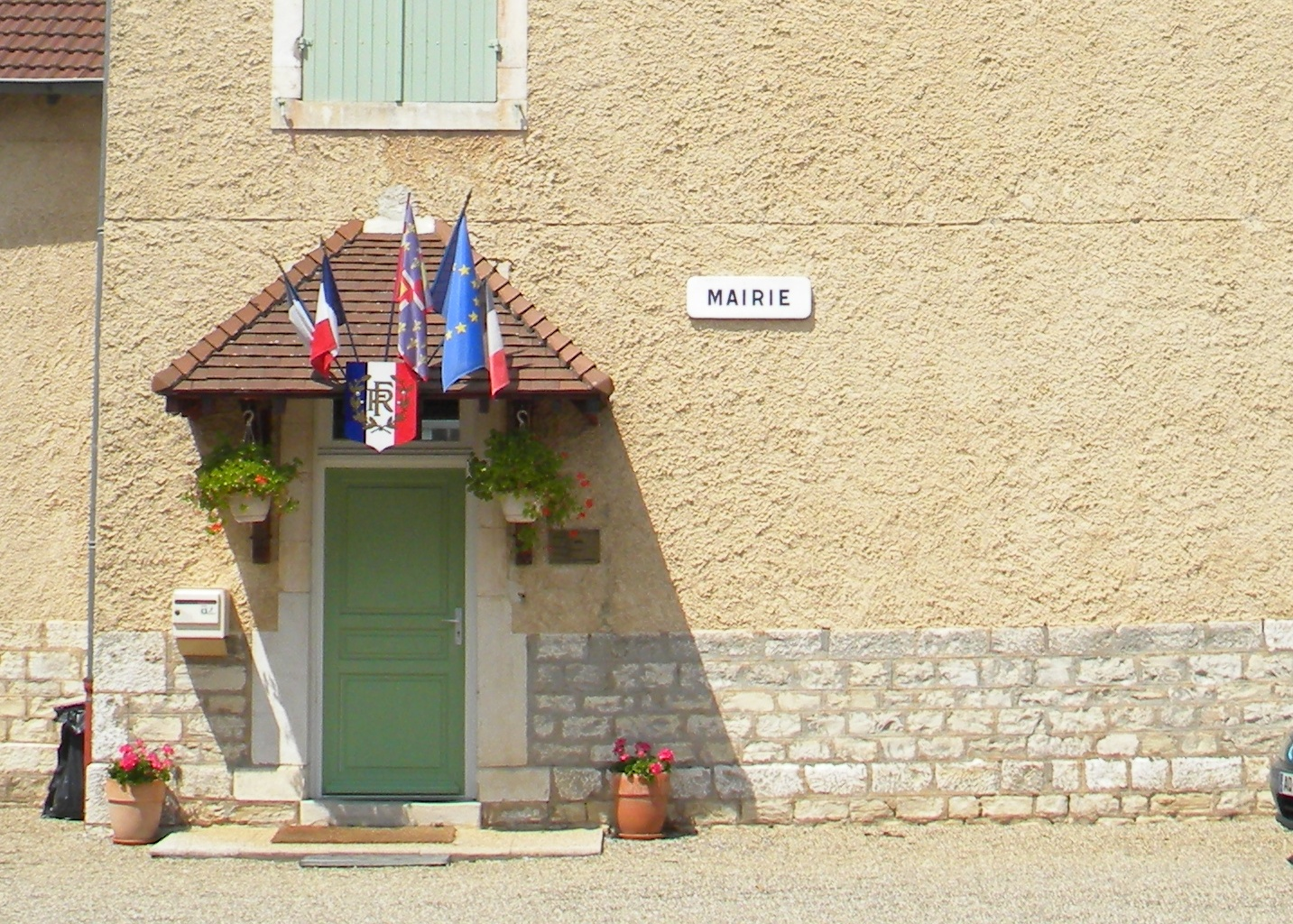 Urbodomo de Lessard-le-National